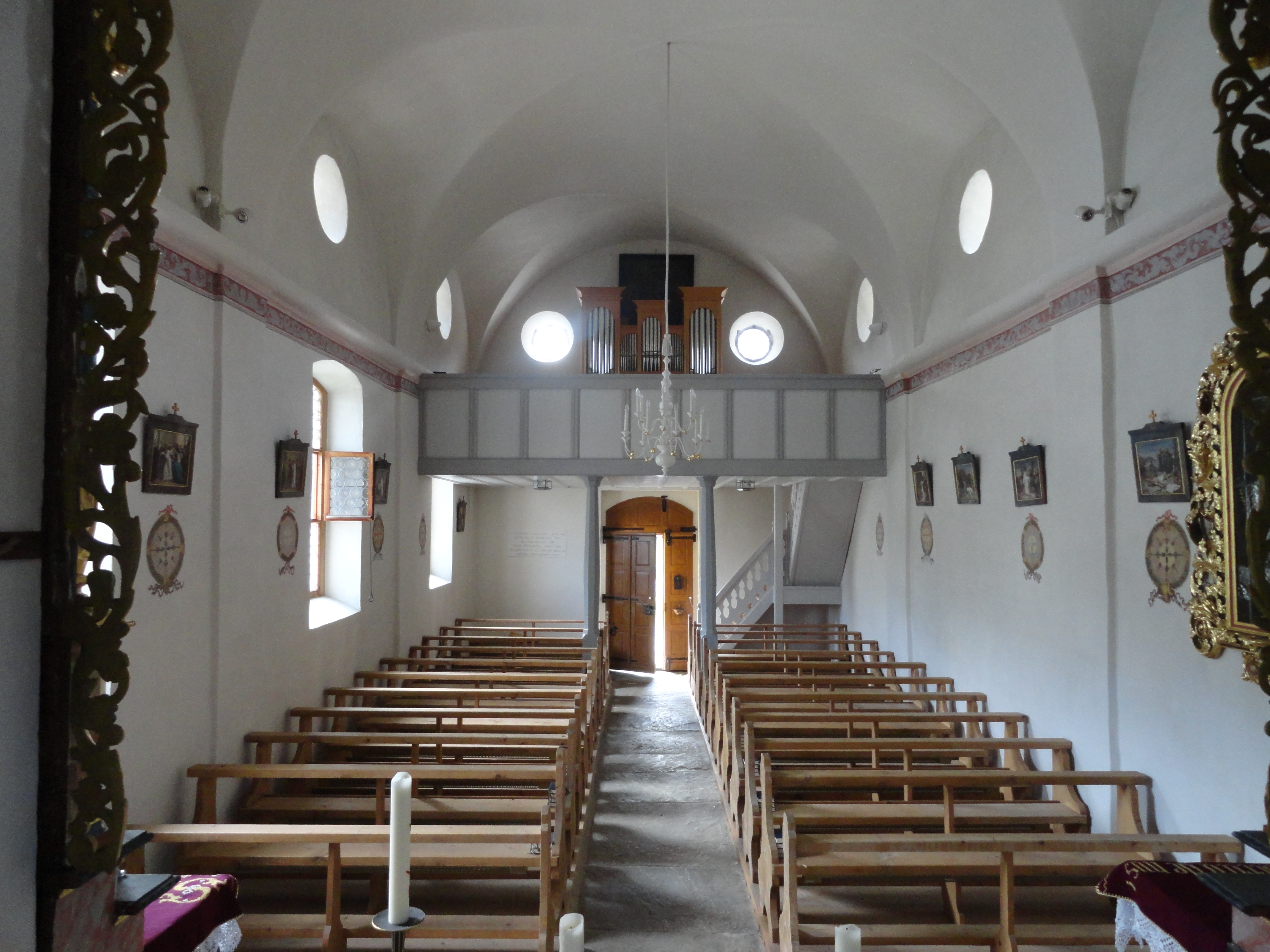 Innenraum Rückseite mit Galerie